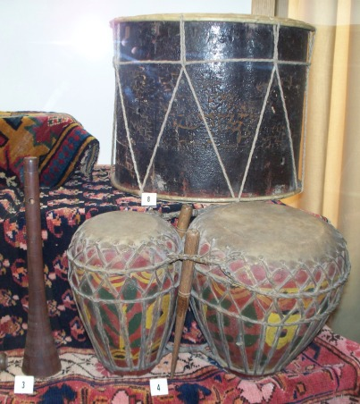 Зурна, Гоша нагара и нагара